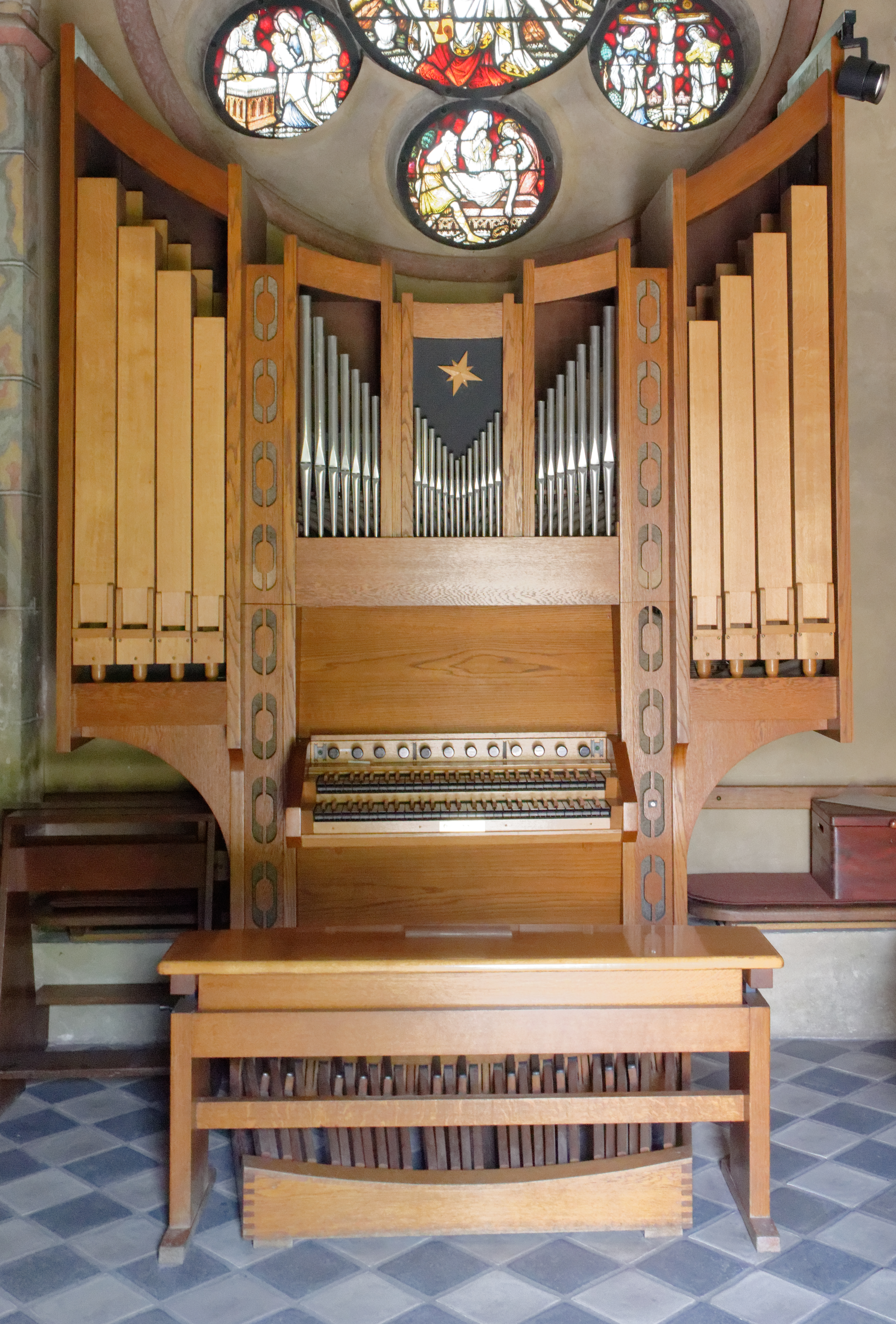 Markuskapelle in Altenberg